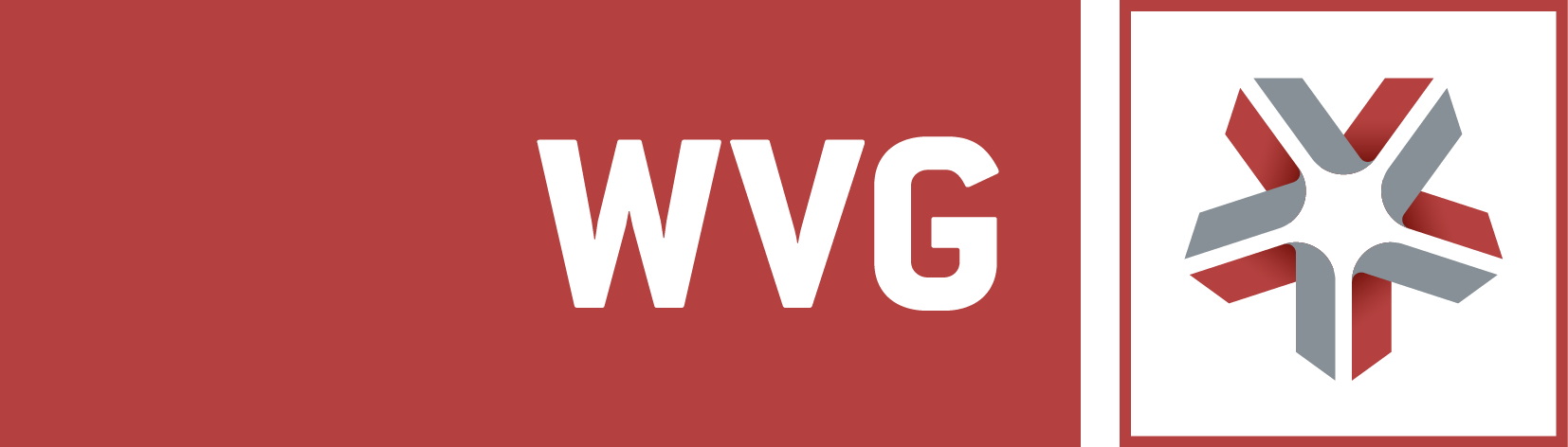 neues Logo der Wolfsburger Verkehrs GmbH ab 2018